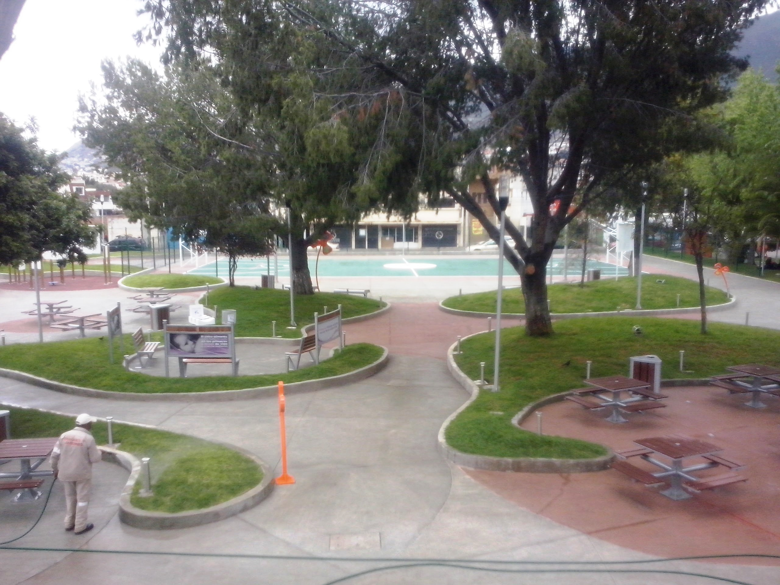 Parque de la Familia en Pachuca, Hidalgo